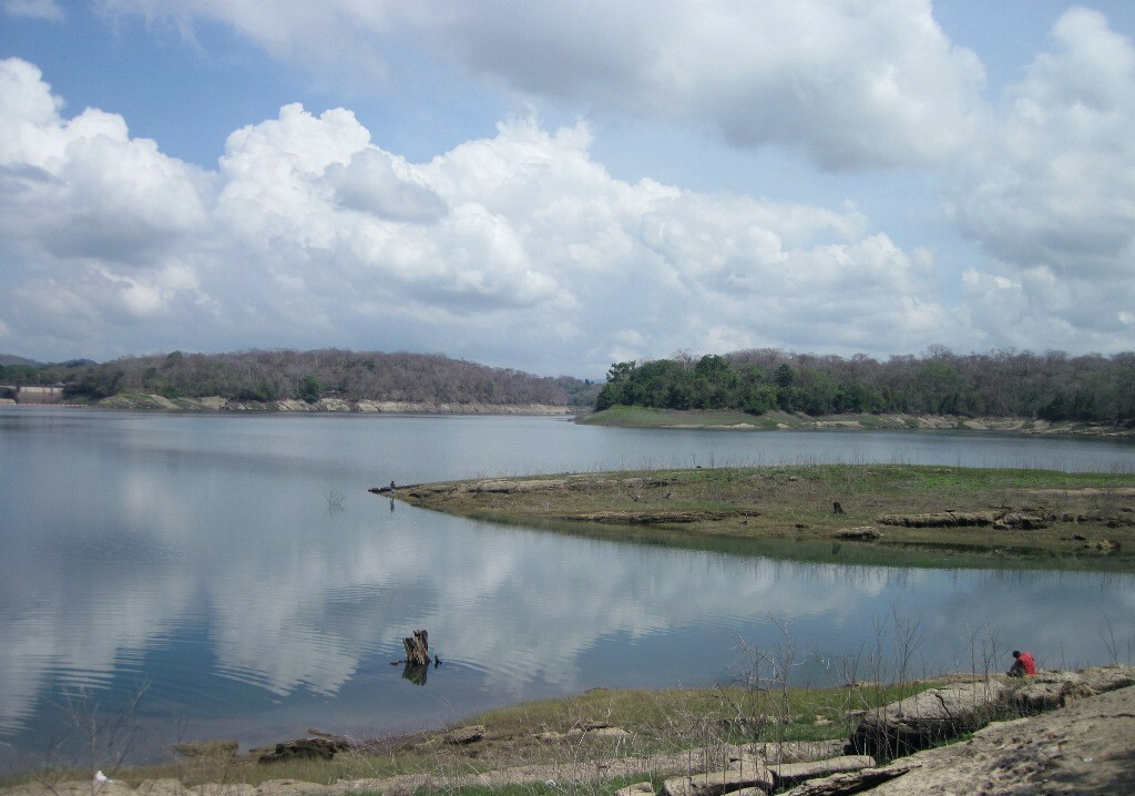 Chilibre; Vista del lago en Chilibre; Panamá; Panamá; Chilibre; Chilibre; 9.150909; -79.62025; Centroide; ; ; Río Chagres